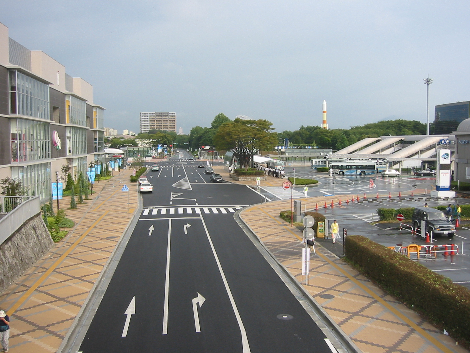 Tsukuba Center, Tsukuba.